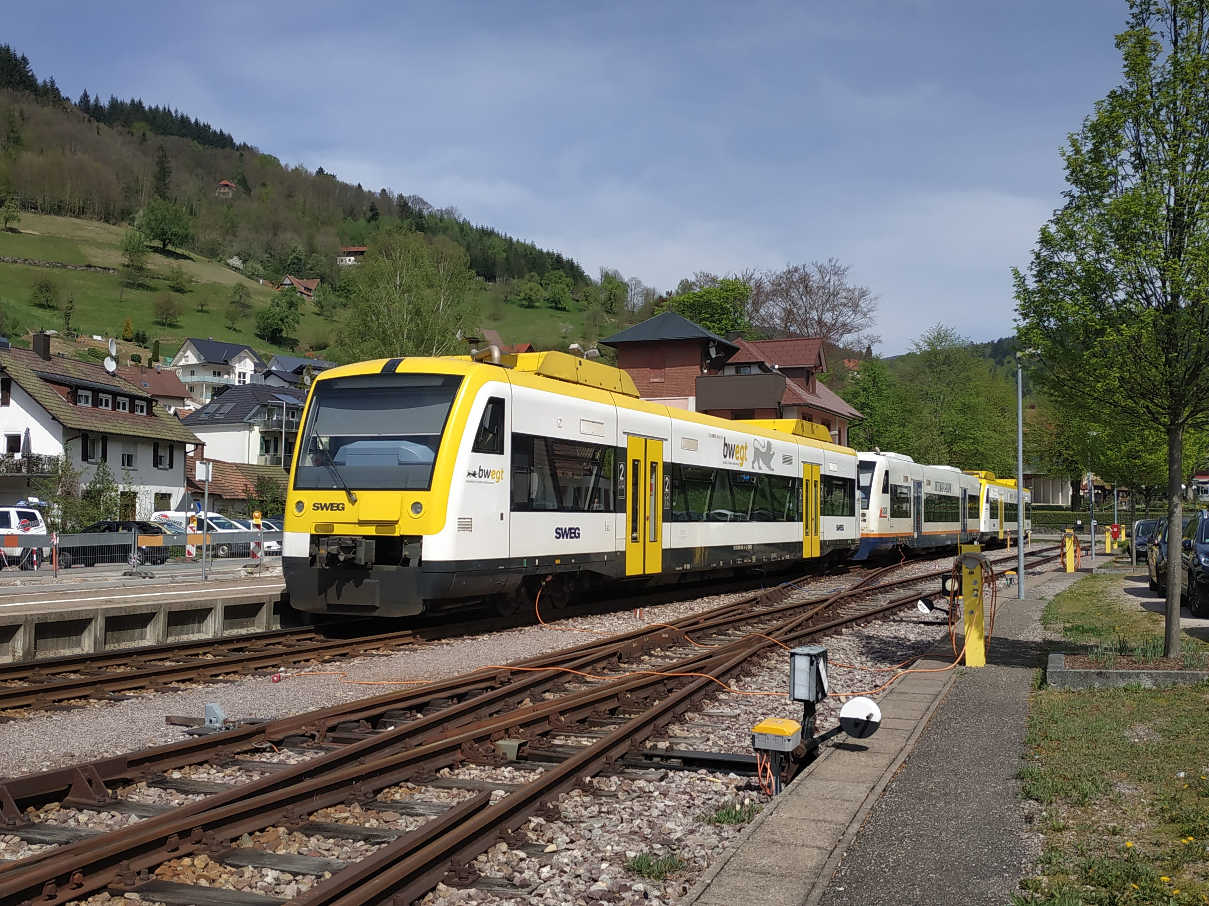 RegioShuttle de la compagnie Ortenau S-Bahn ainsi que de la compagnie SWEG en gare de Ottenhöfen im Schwarzwald